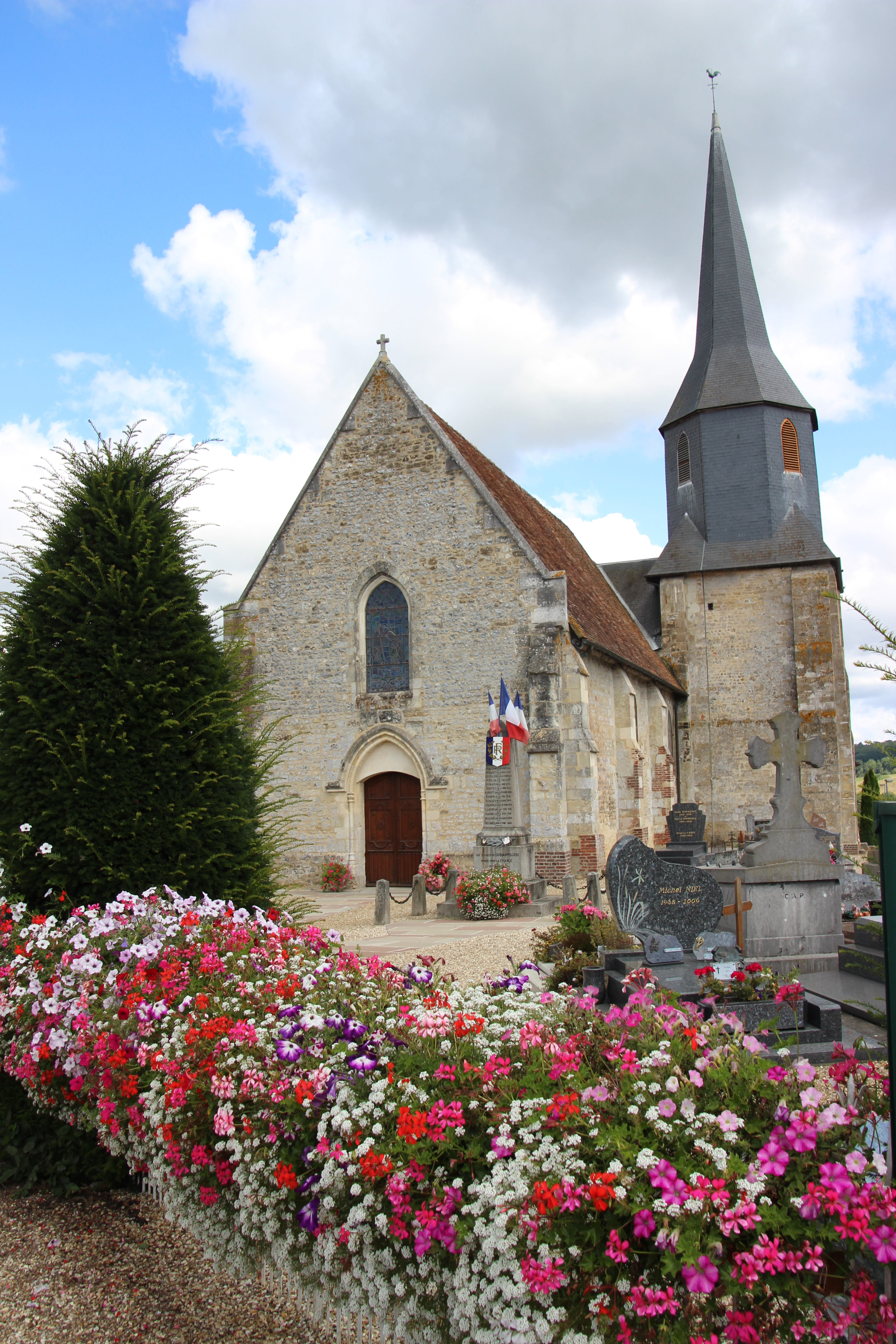 église Coquainvilliers